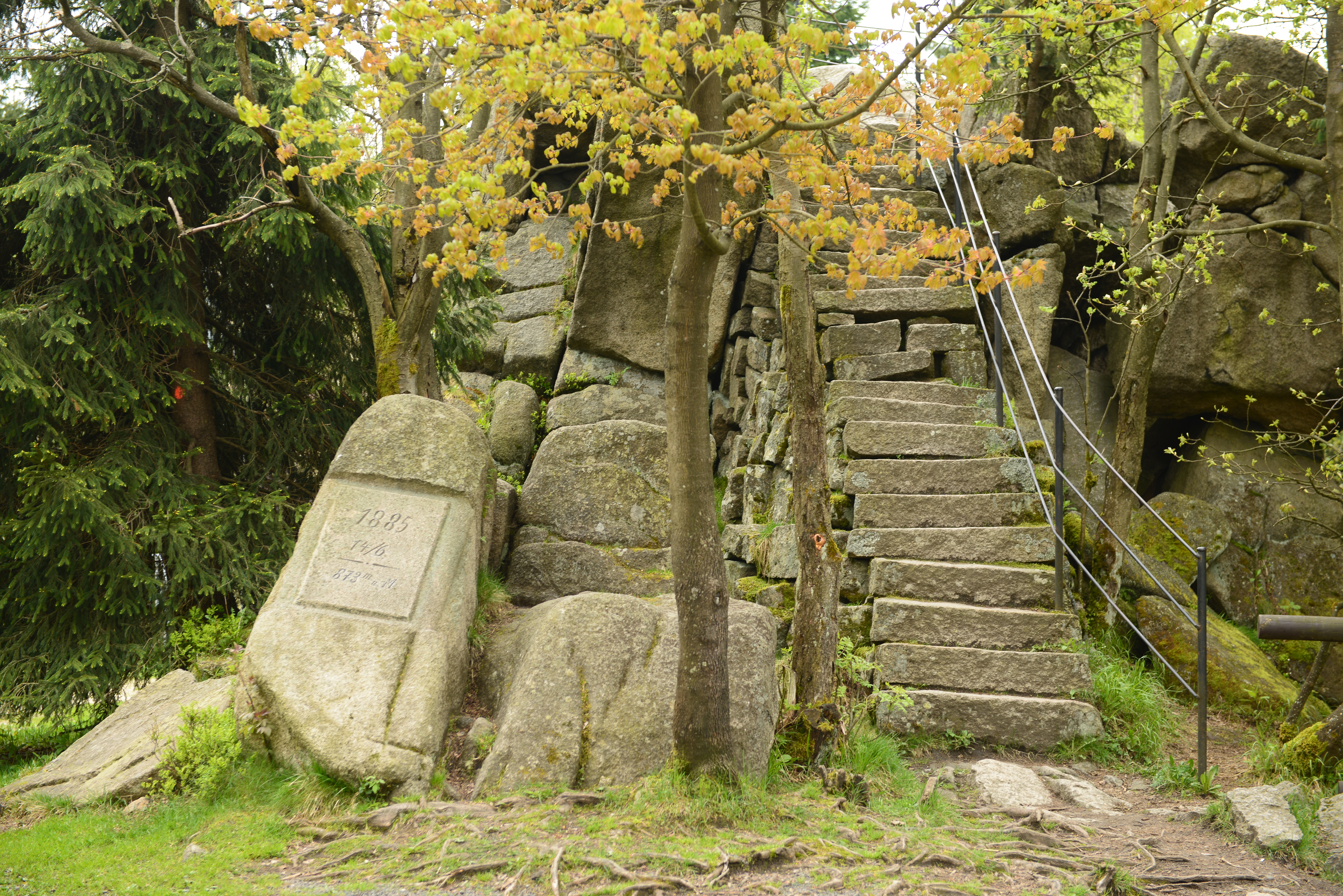 Střední Smržovka